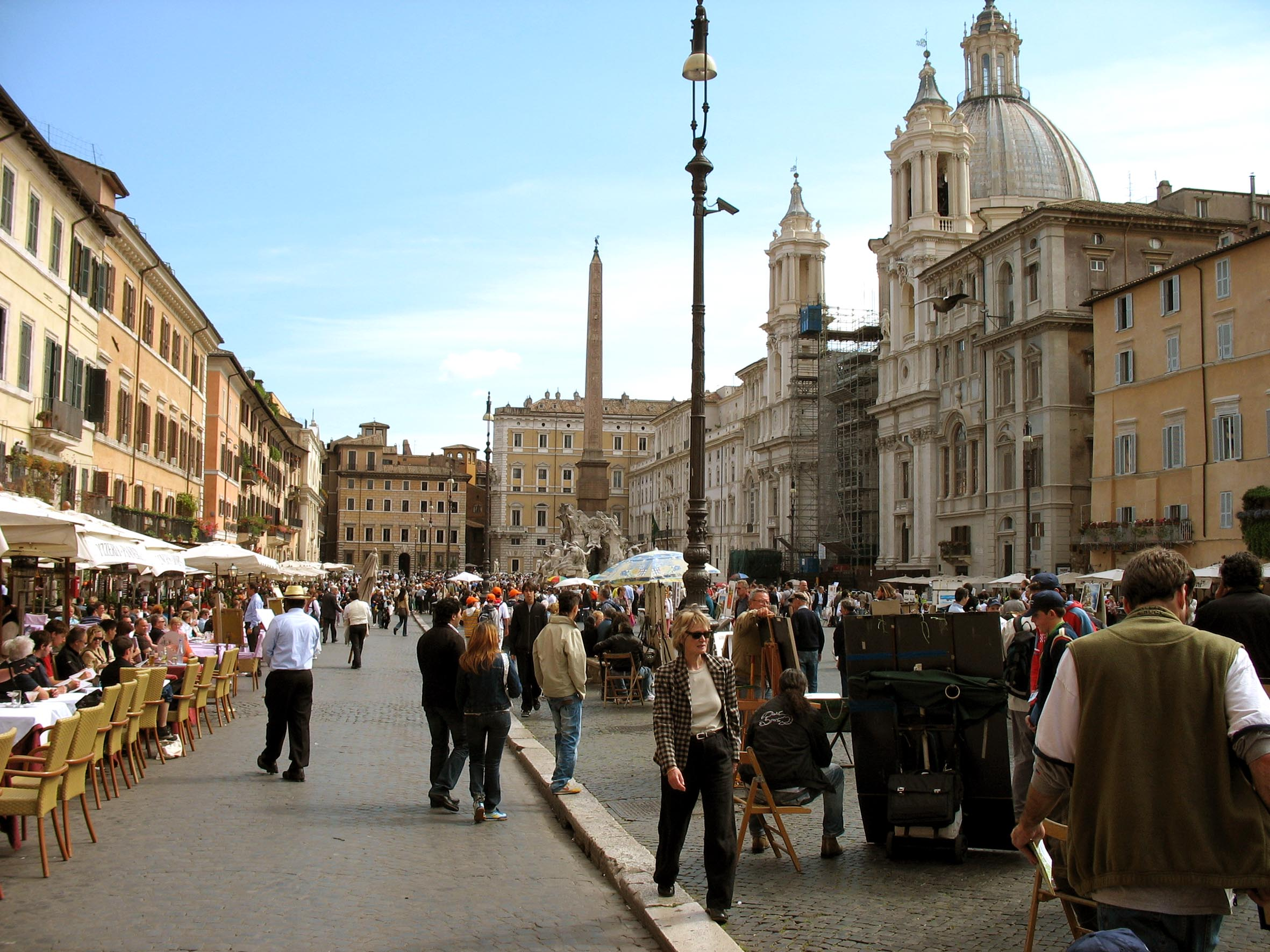 Piazza Navona, Roma from